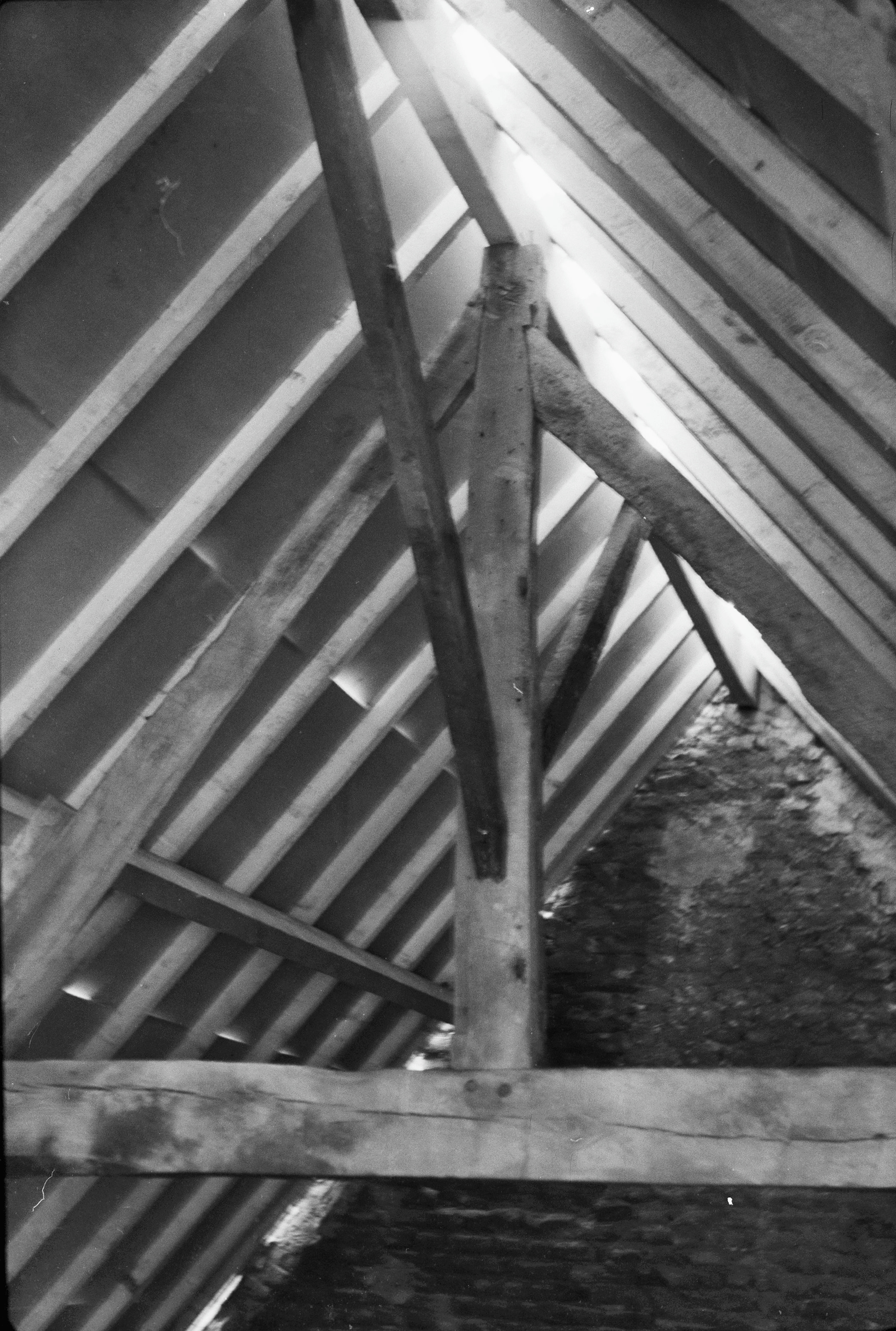 Den Tempel: hoge gedeelte kap